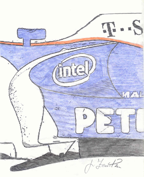 barge board development